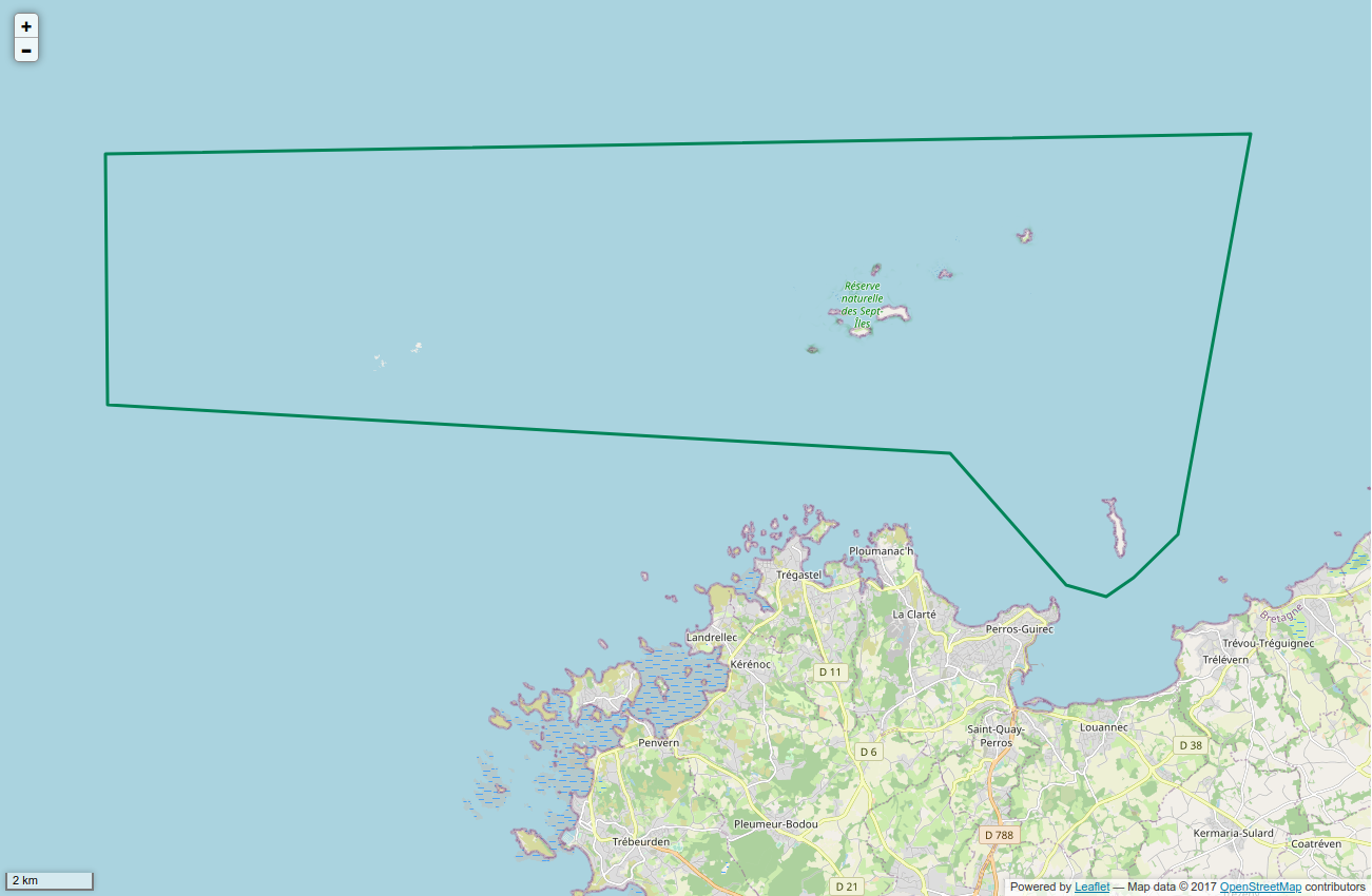 Périmètre de la RNN des Sept Iles.